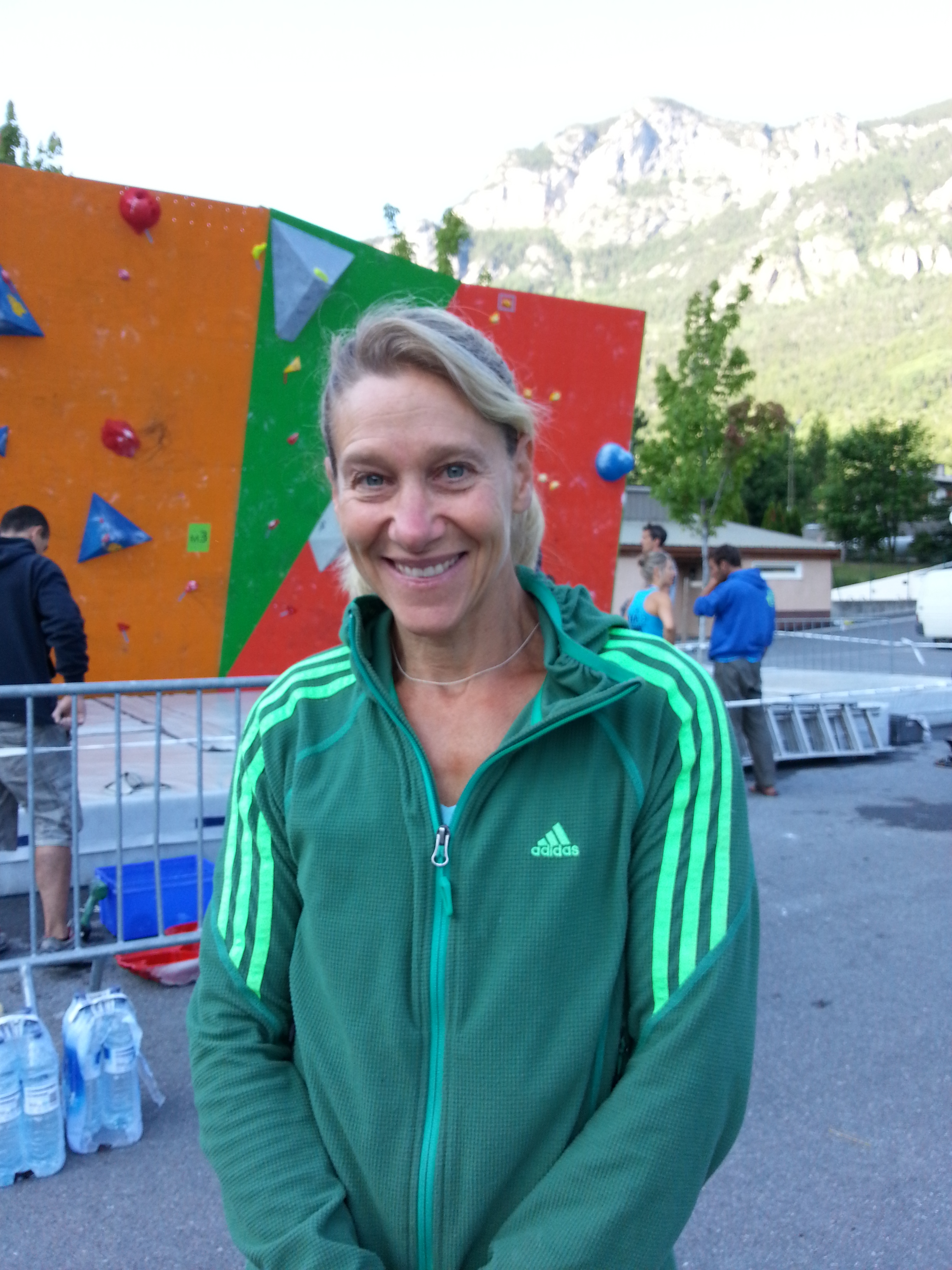 Robyn Erbesfield-Raboutou en juillet 2013 à L'Argentière-la-Bessée